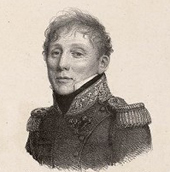 Portrait de Claude-Antoine-Gabriel_de_Choiseul